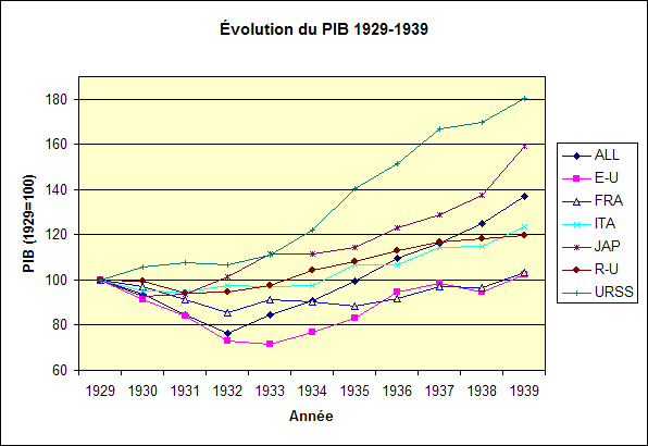 PIB 1929-1939 (GDP 1929-1939, legend in French)